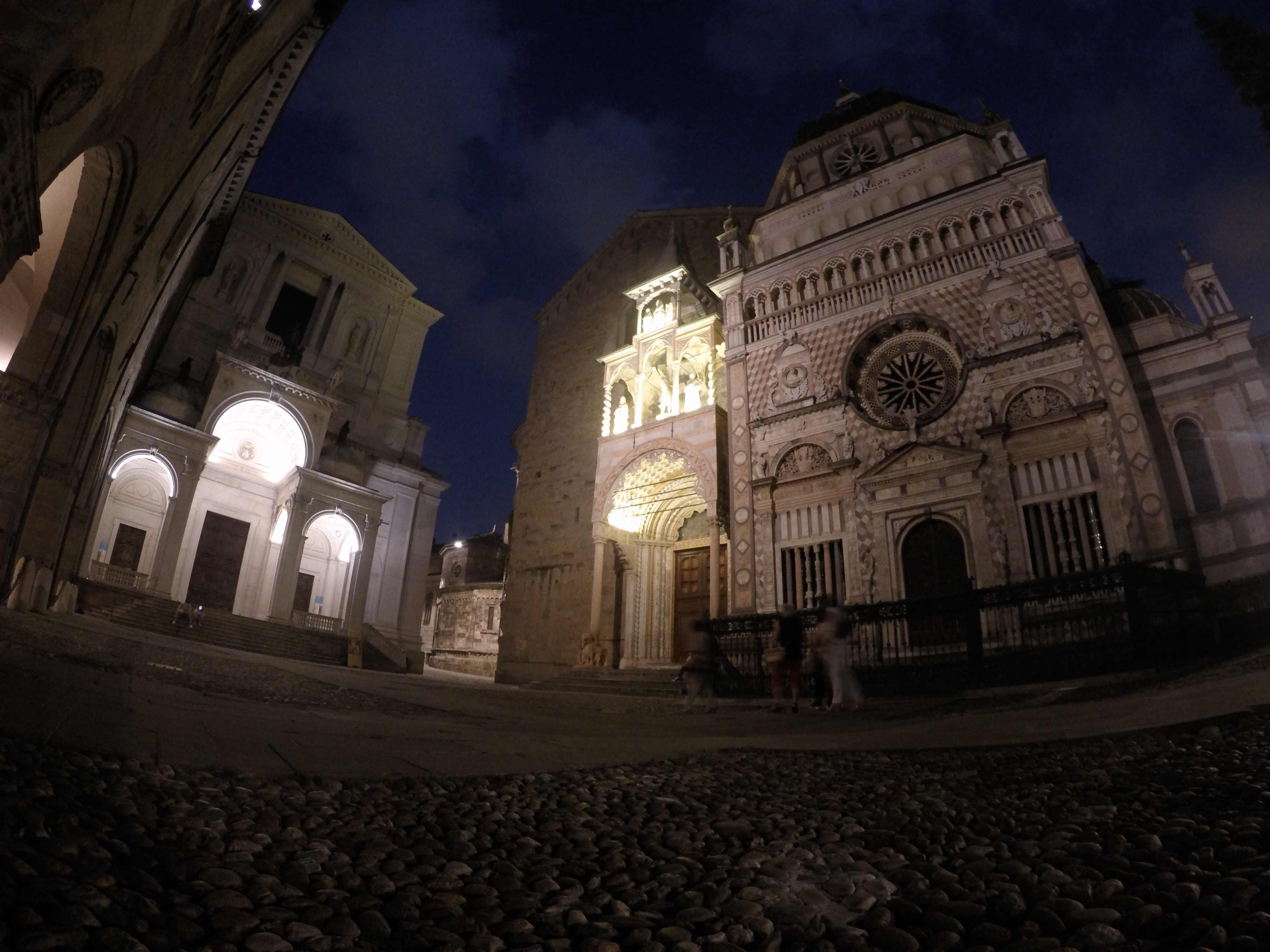 Città Alta, Bergamo BG, Italy